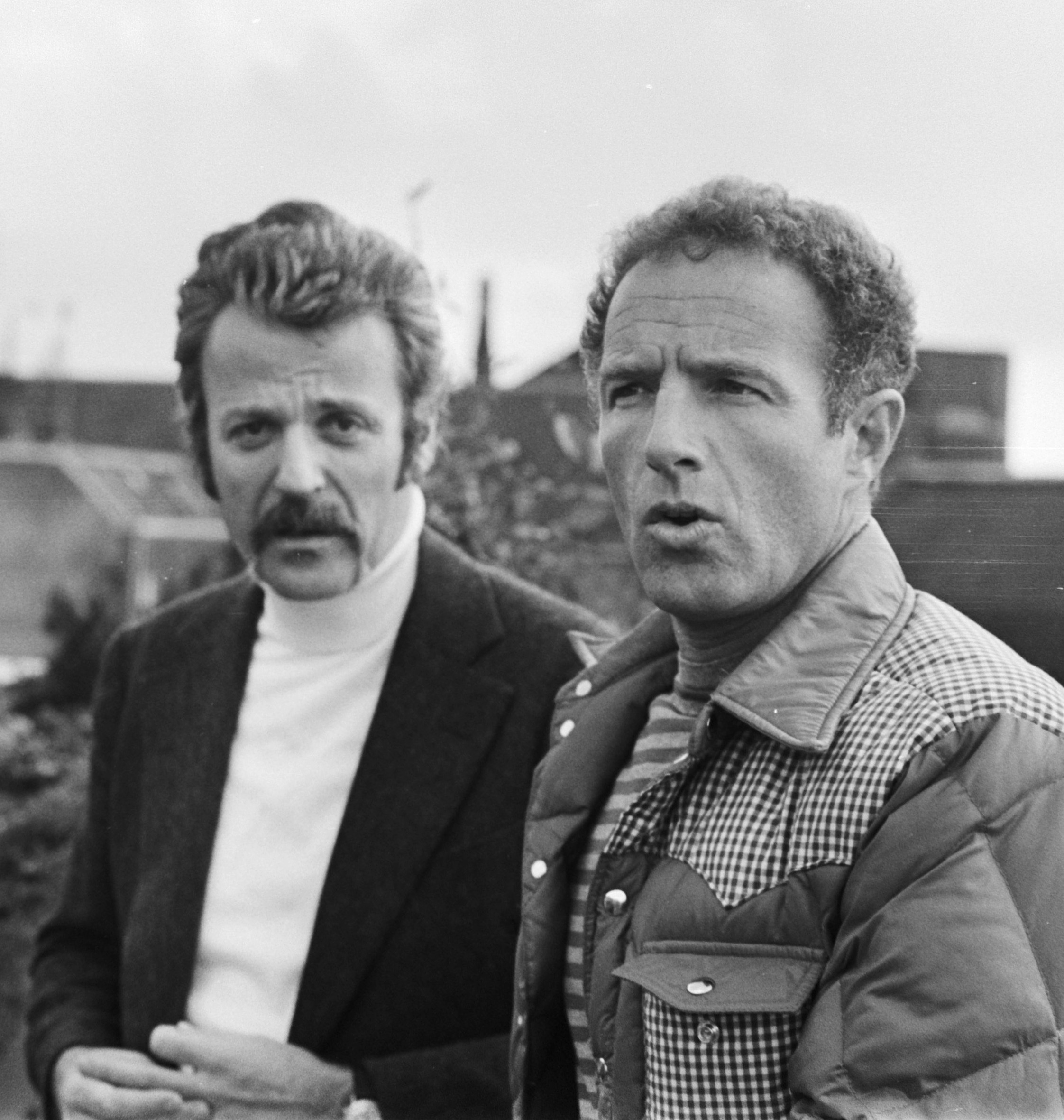 Persconferentie i.v.m. film "Een brug te ver" ("A Bridge too Far"); rechts James Caan, een der hoofdrolspelers en scenarioschrijver W. Goldman